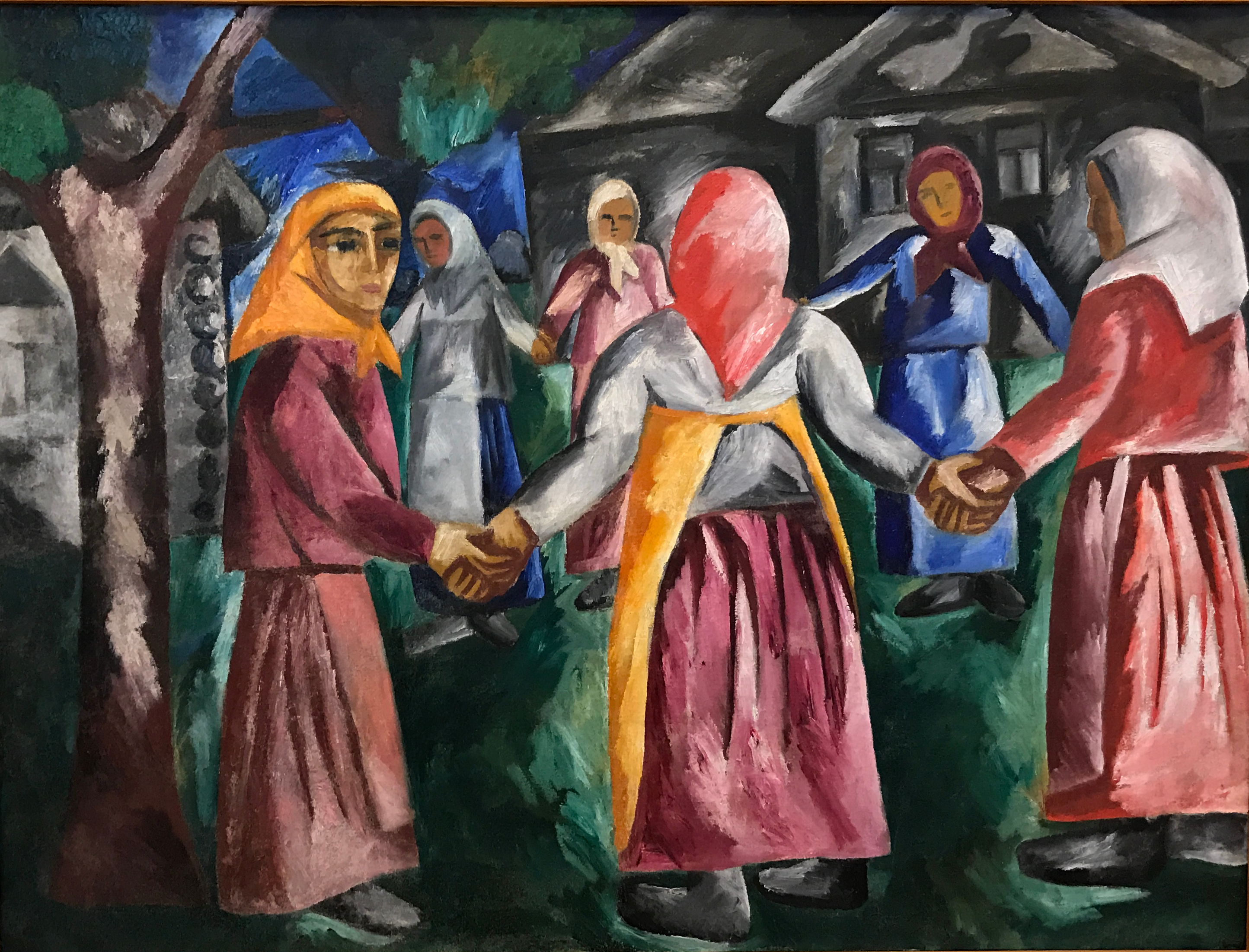 Хоровод (Холст, масло). Картина